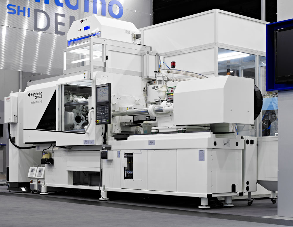 In der besonders kompakten Fertigungszelle mit einer Reinraumzelle der Max Petek Reinraumtechnik über dem Werkzeugeinbauraum demonstriert die vollelektrische Spritzgießmaschine IntElect 100-340 ihre Tauglichkeit für Reinräume der ISO-Klasse 7.